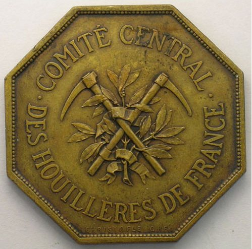 Numismatique des Mines et des Carrières Comité Central des Houillères de France jeton octogonal en laiton 40mm 1924 TTB+